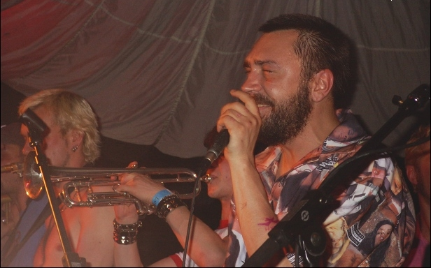 Sergei Shnurov (Shnur) performing in San Francisco, June 2003